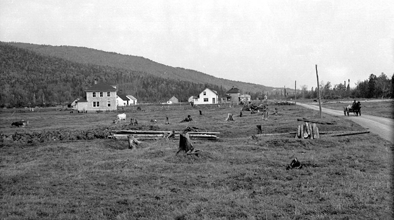 Vue de la colonie de Grande-Vallée, comté de Gaspé